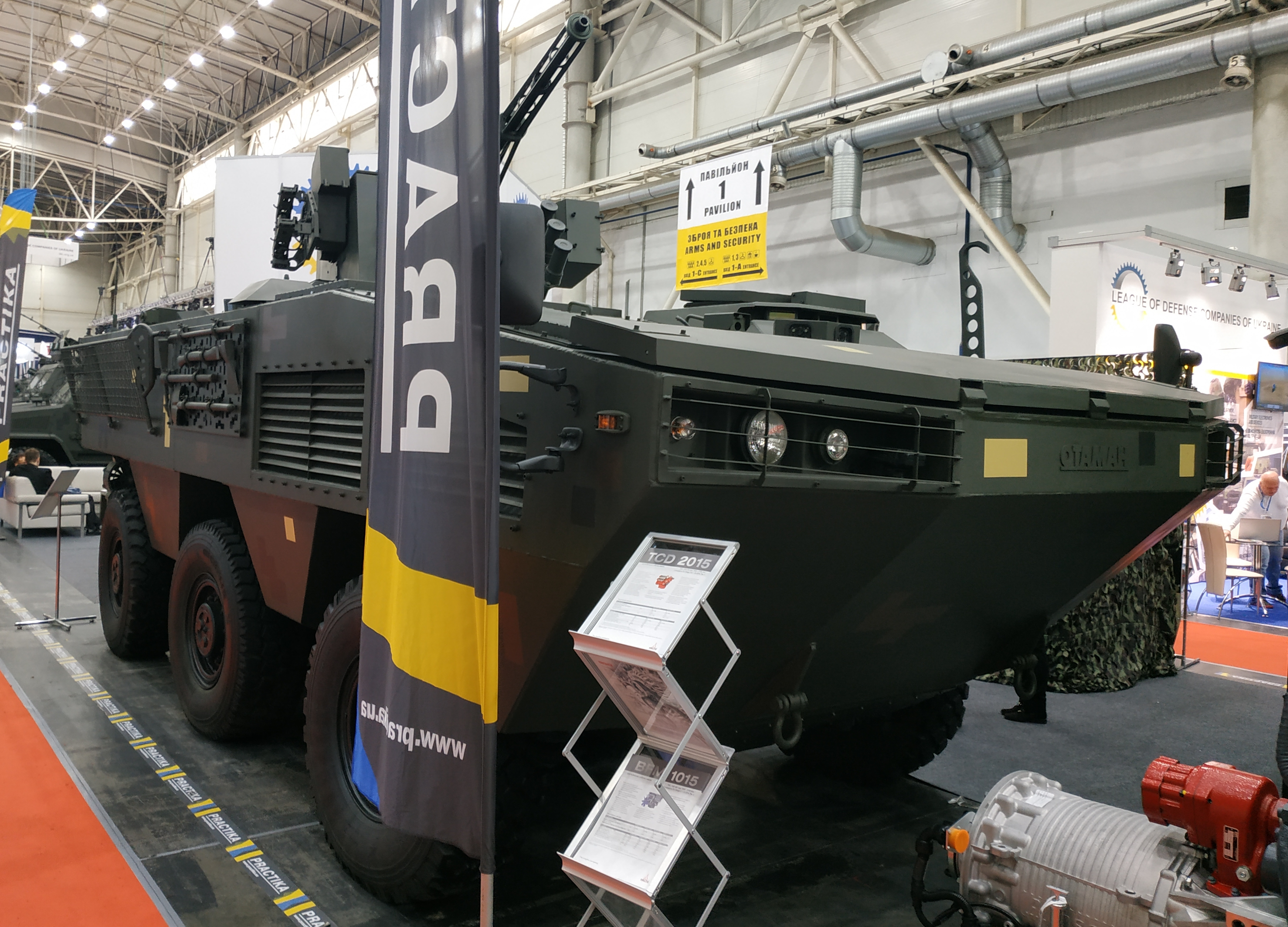 Бронетранспортер с колесной формулой 6х6 "Отаман-3" на стенде НПО "Практика". Выставка "Зброя та безпека", Киев, октябрь 2019 г.